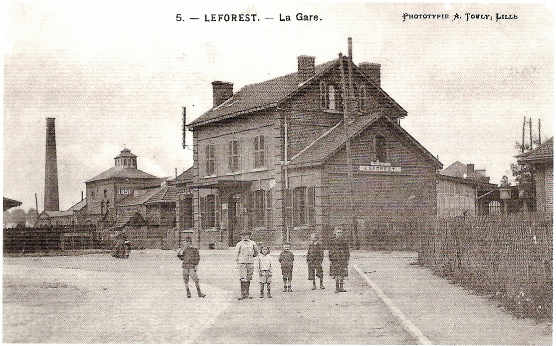 La Fosse n° 2 de la Compagnie des mines de l'Escarpelle était un charbonnage constitué d'un seul puits situé à Leforest, Pas-de-Calais, Nord-Pas-de-Calais, France. La fosse apparaît en arrière-plan de la gare de Leforest.